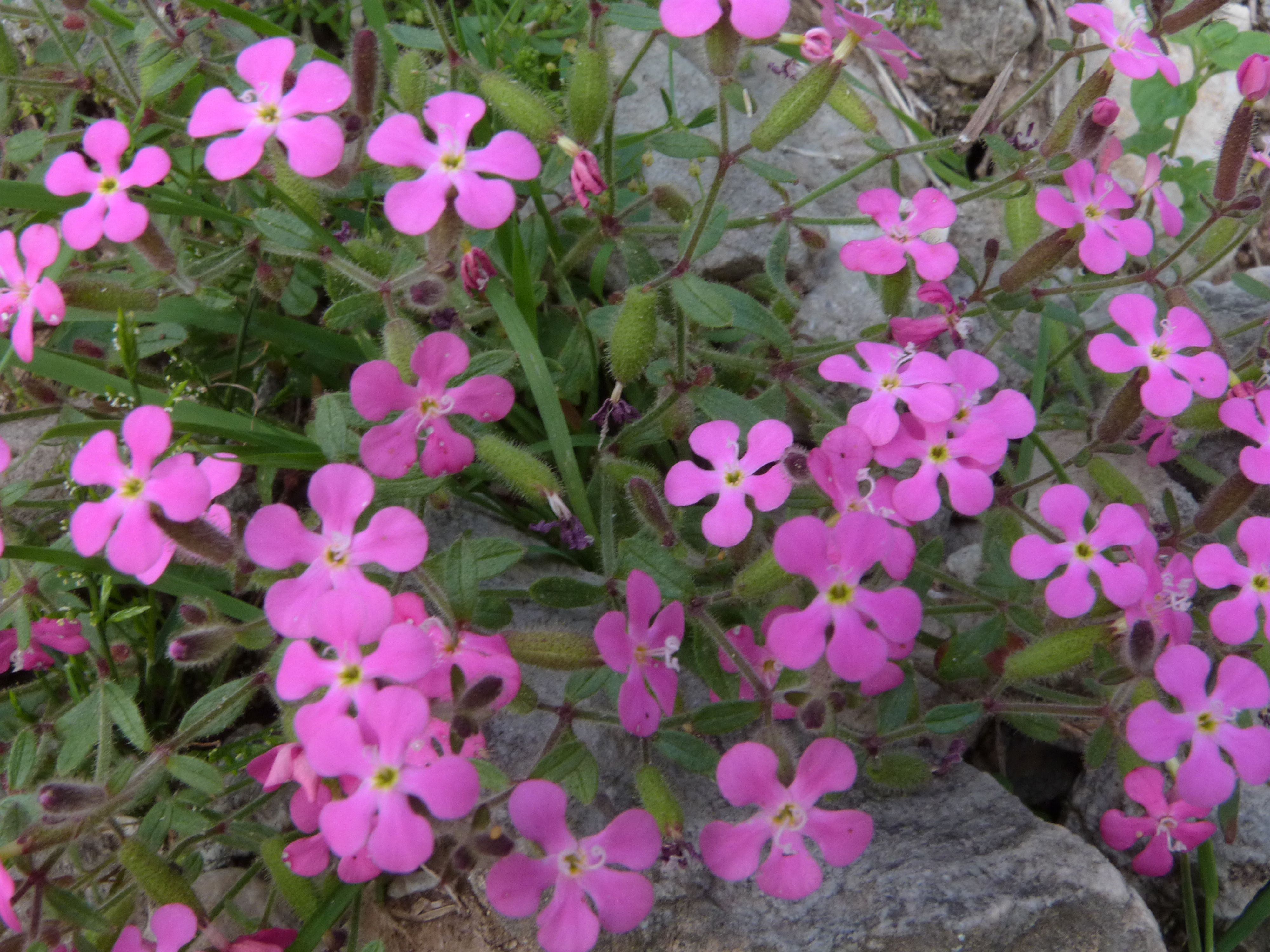 Saponaria calabrica, bei Kataraktis im Tsoumerka-Massiv/Epirus aufgenommen.